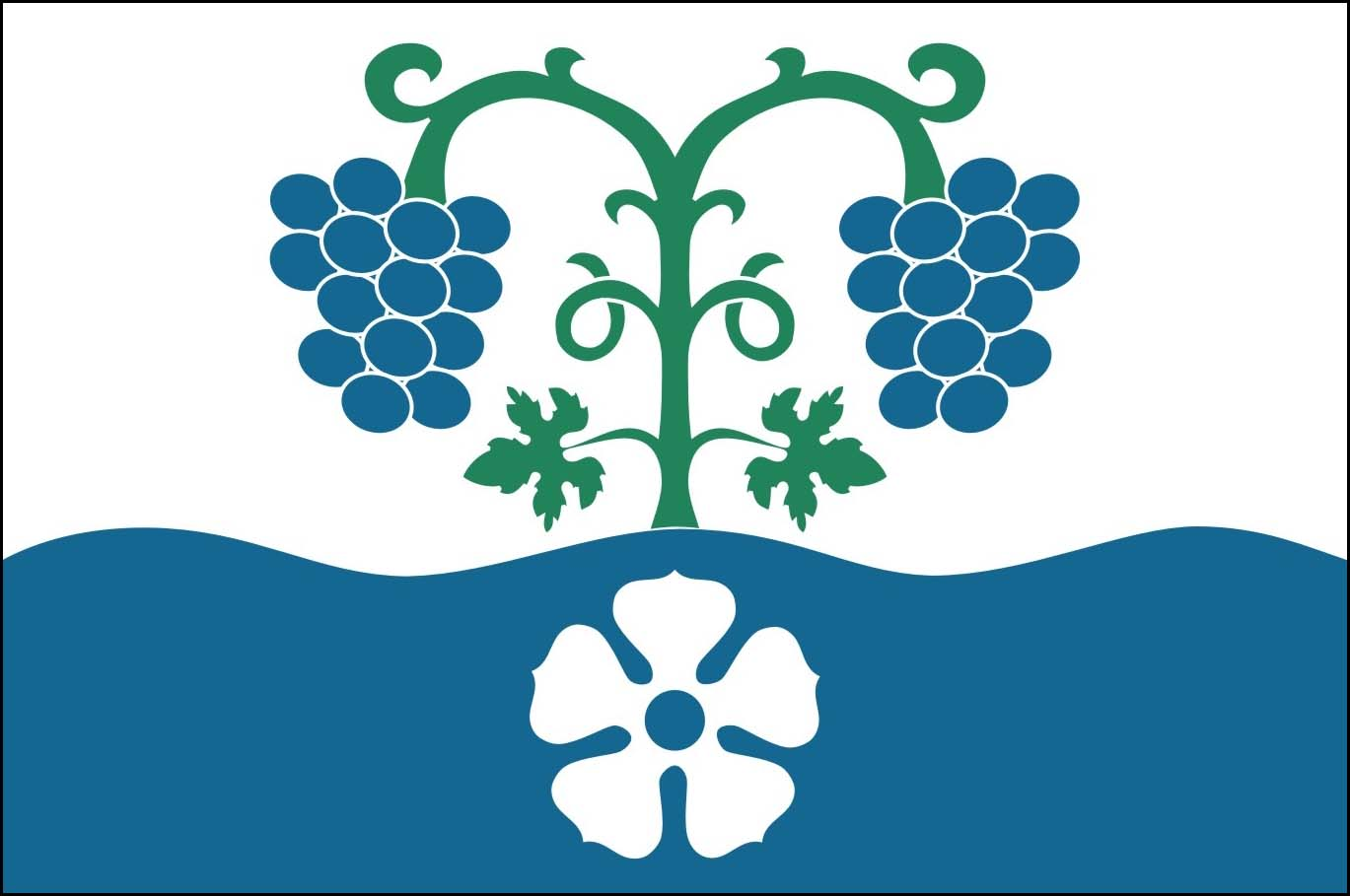 Vlajka obce Kly